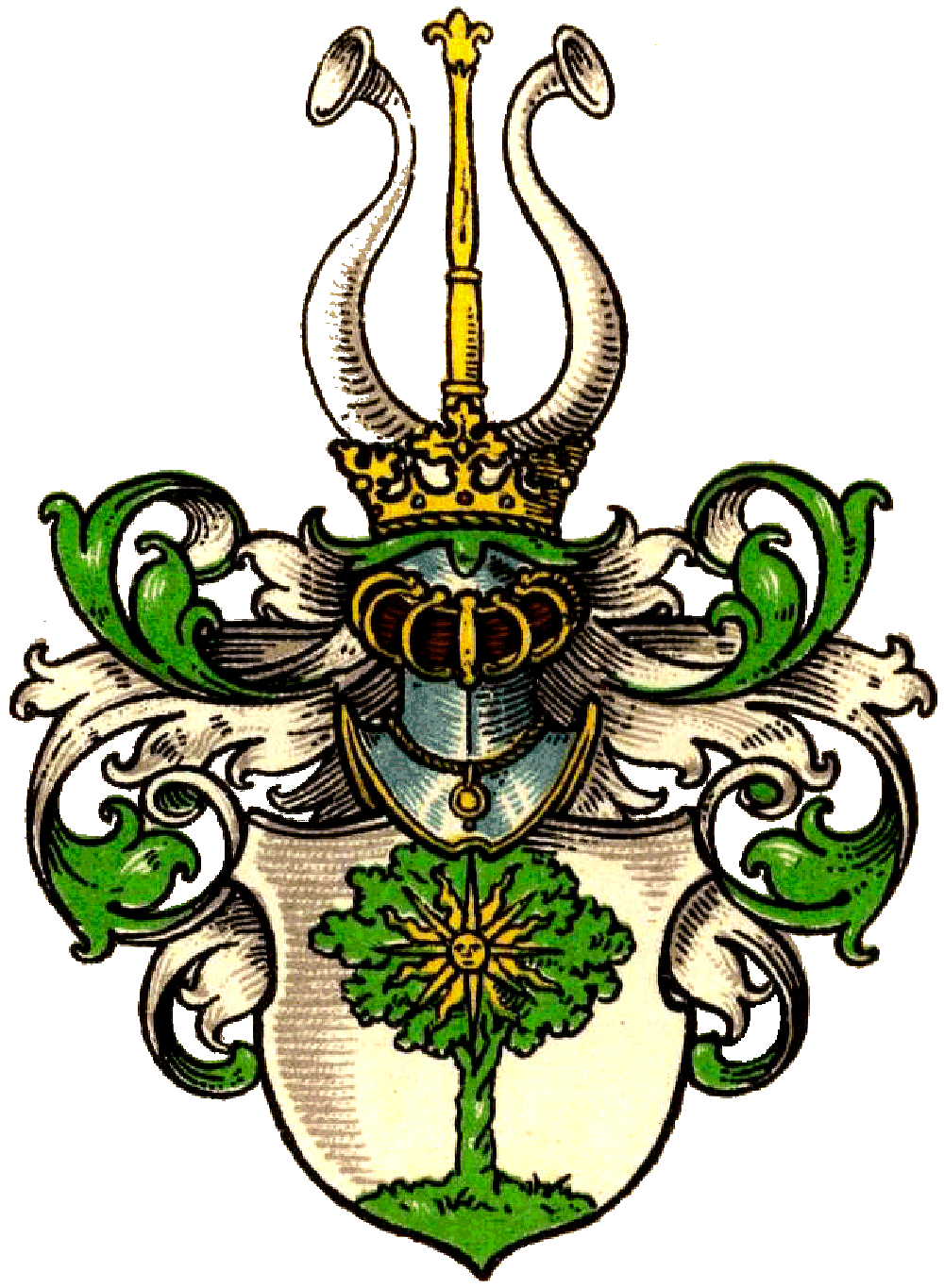 Wappen derer von Heister